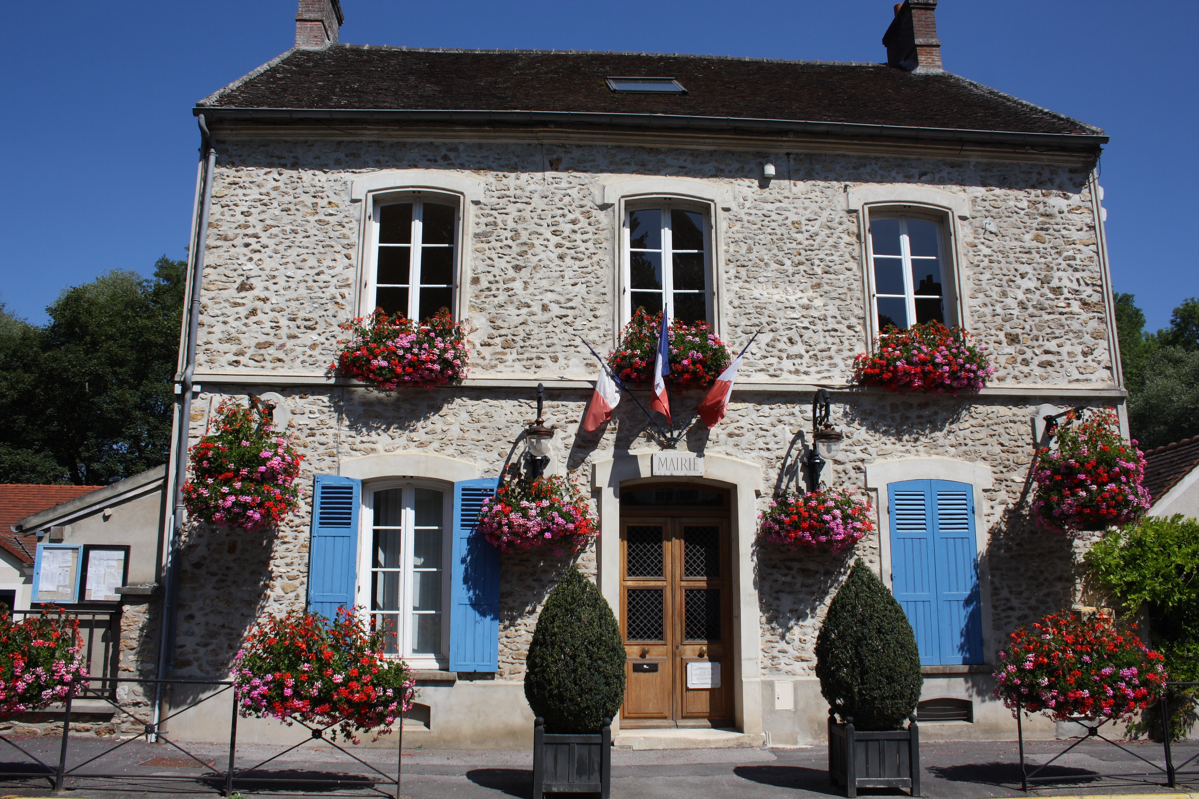 Mairie (Bürgermeisteramt) von La Celle-sur-Morin im Département Seine-et-Marne in der Region Île-de-France (Frankreich)